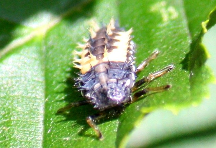 Larve des Asiatischen Marienkäfers